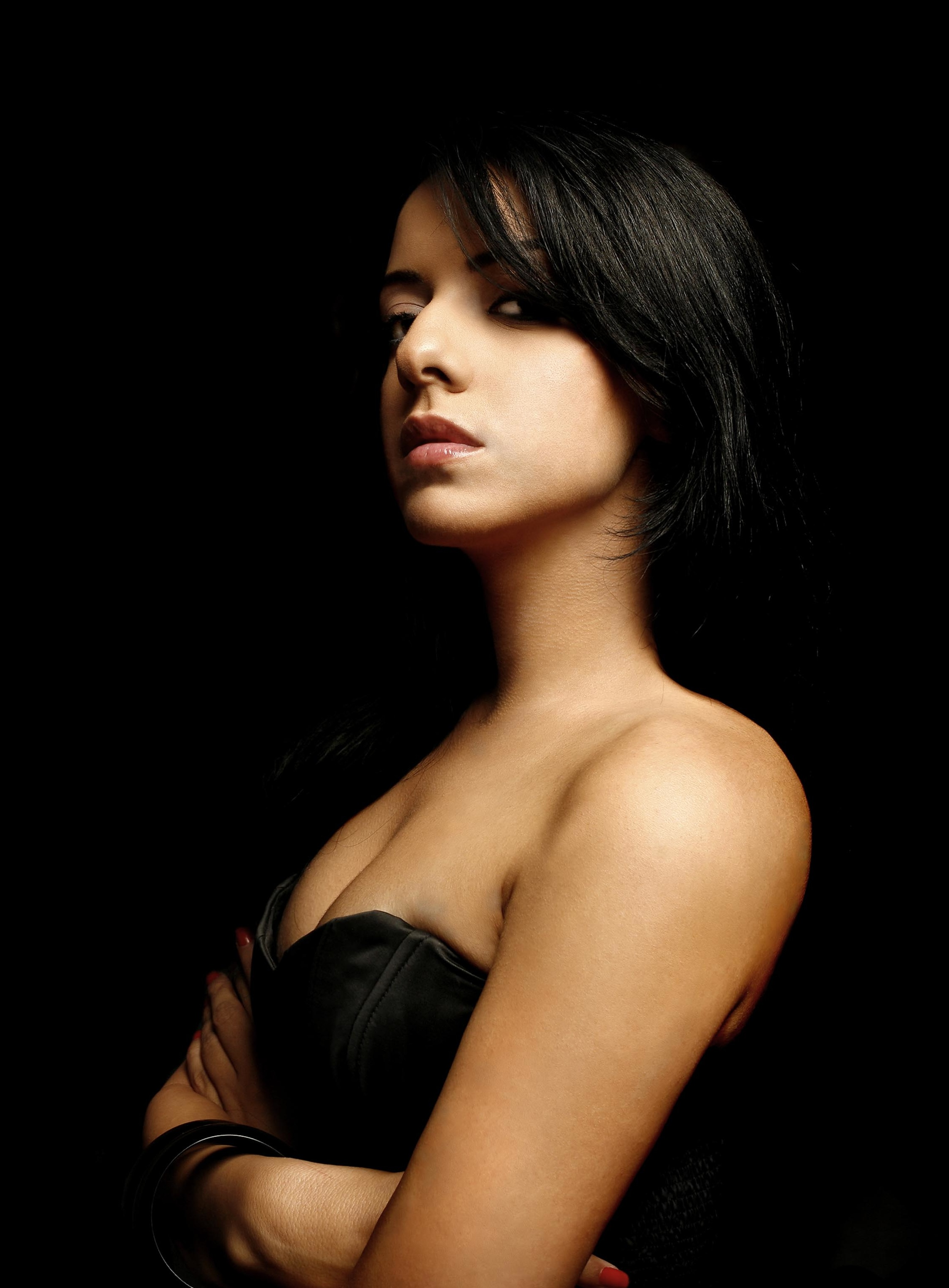 Portrait Of Lebanese Film Director Leila Kanaan